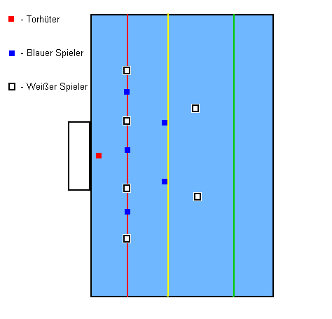 4-2-System. Überzahlaufstellung für Wasserball.